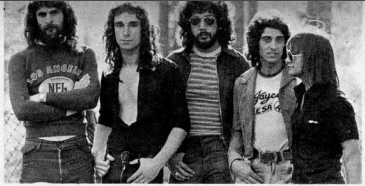 Fotografía de la banda argentina de rock sinfónico El Reloj hacia 1977.